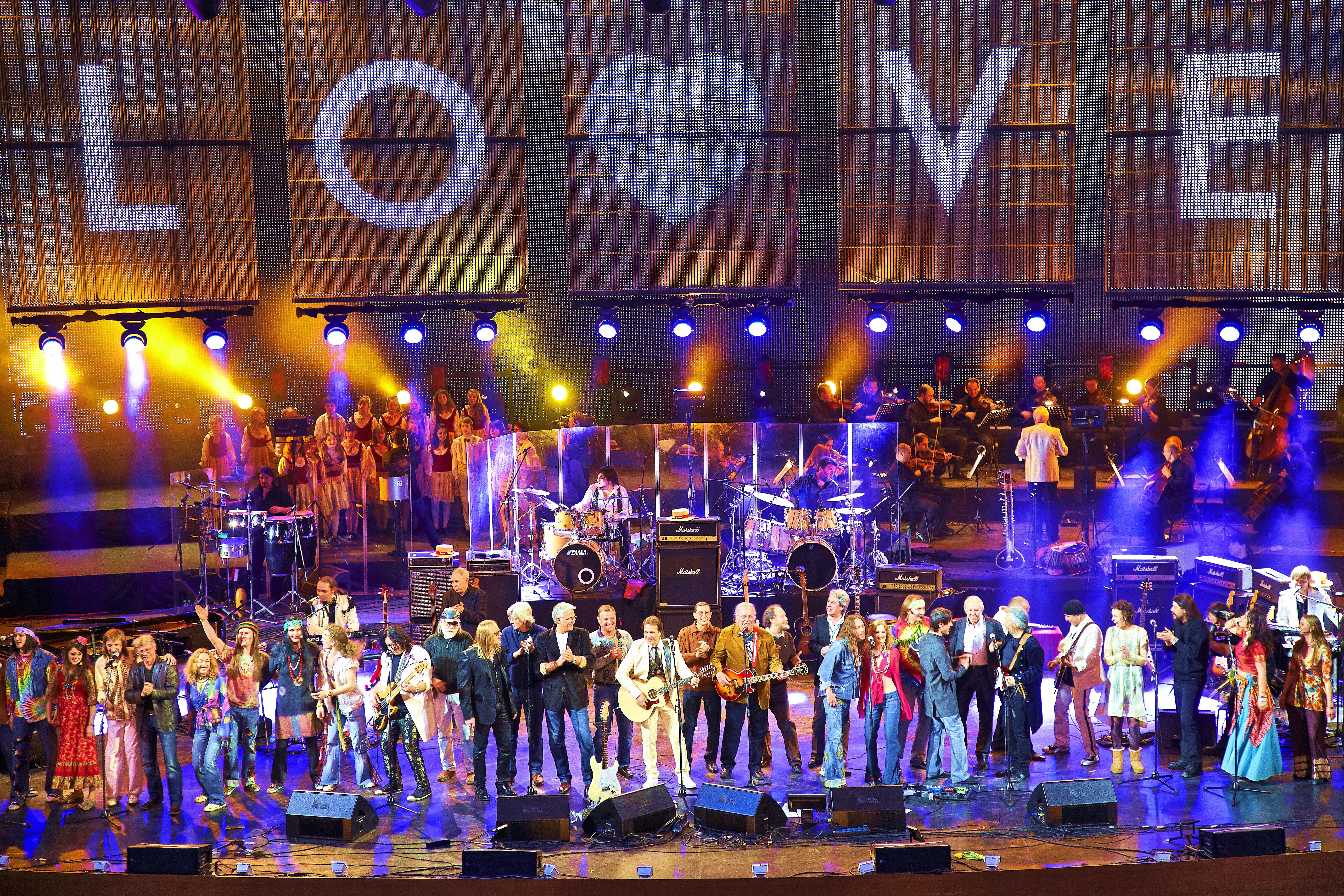 Финал юбилейного концерта 06.03.2010 Группа «Цветы», камерный оркестр «Солисты Москвы» под управлением Юрия Башмета, хор Детского Театра Эстрады, хор солистов Московского Театра Музыки и Драмы и звезды отечественной рок и поп музыки.